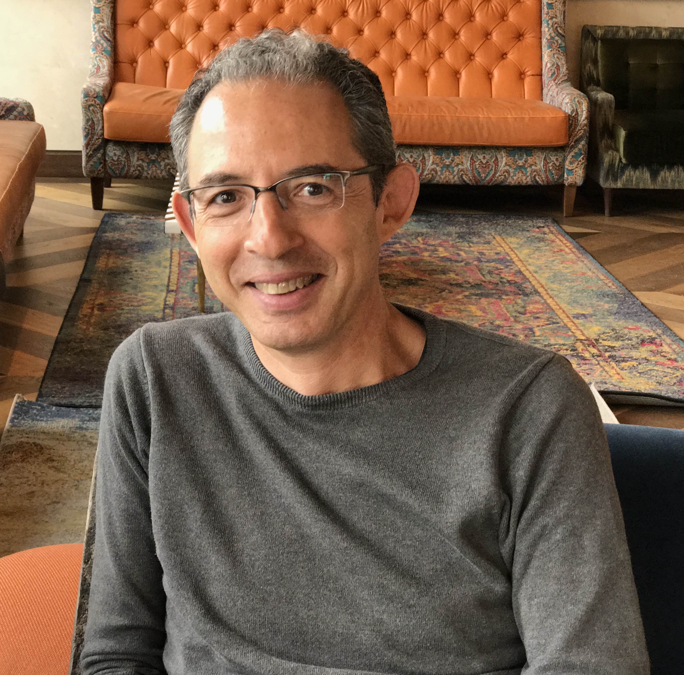 C'est Sophien Kamoun, scientifique tunisien de renommée internationale spécialisé en pathologie végétale